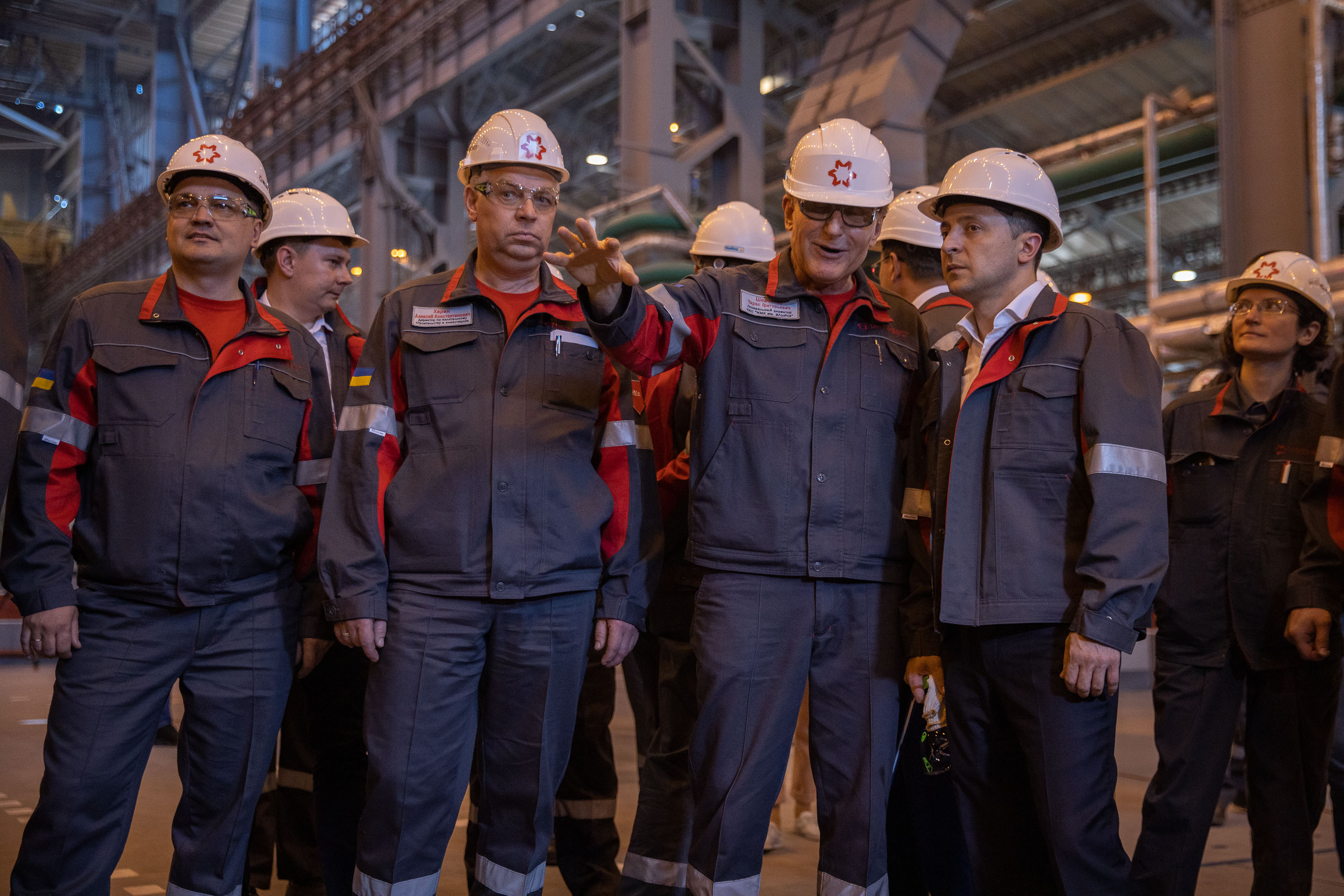 Президент України Володимир Зеленський під час відвідання ПрАТ «Маріупольський металургійний комбінат ім. Ілліча» взяв участь у церемонії підписання інвестиційного контракту між «Метінвест Холдинг» та Air Liquide щодо будівництва комплексу повітророзподільної установки.